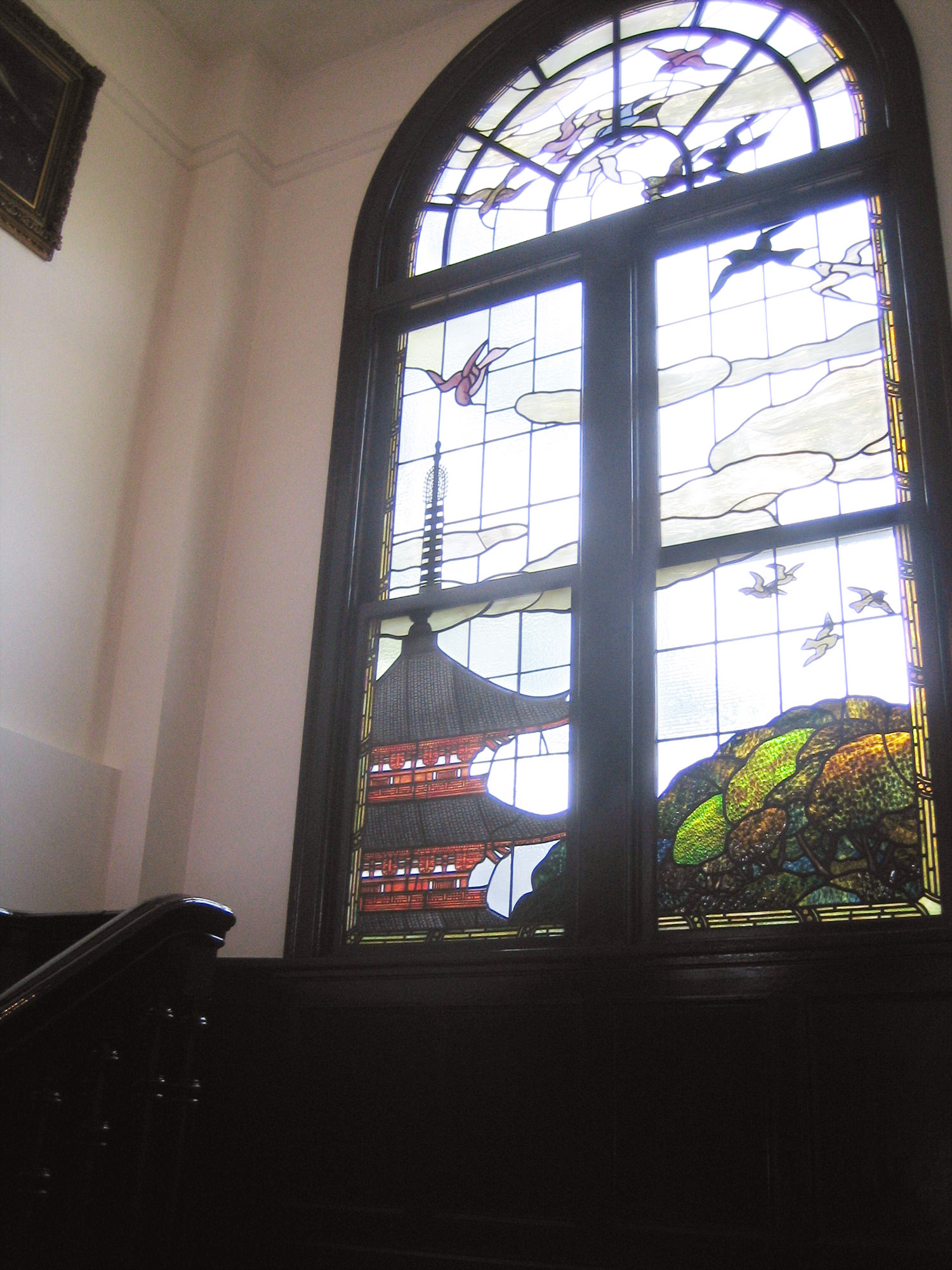 Hatoyama Hall (鳩山会館), at Otowa, Bunkyo, Tokyo, Japan